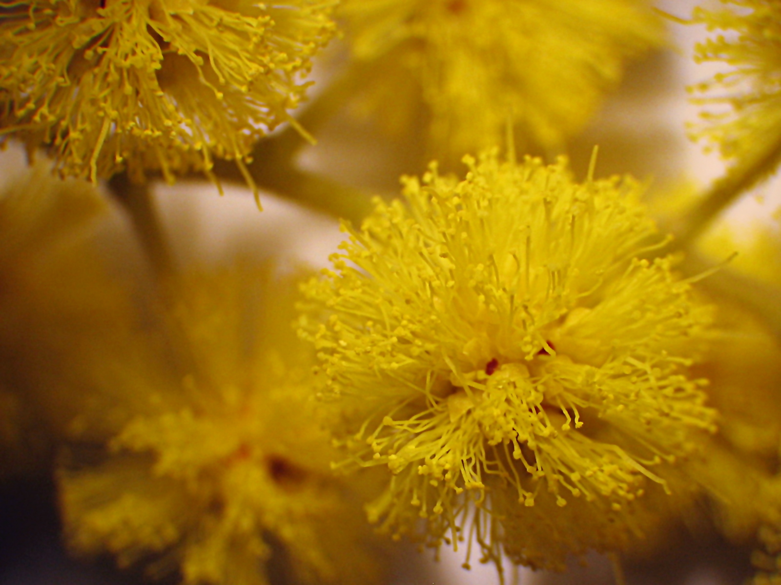 Acacia dealbata under 10x stereomicroscope